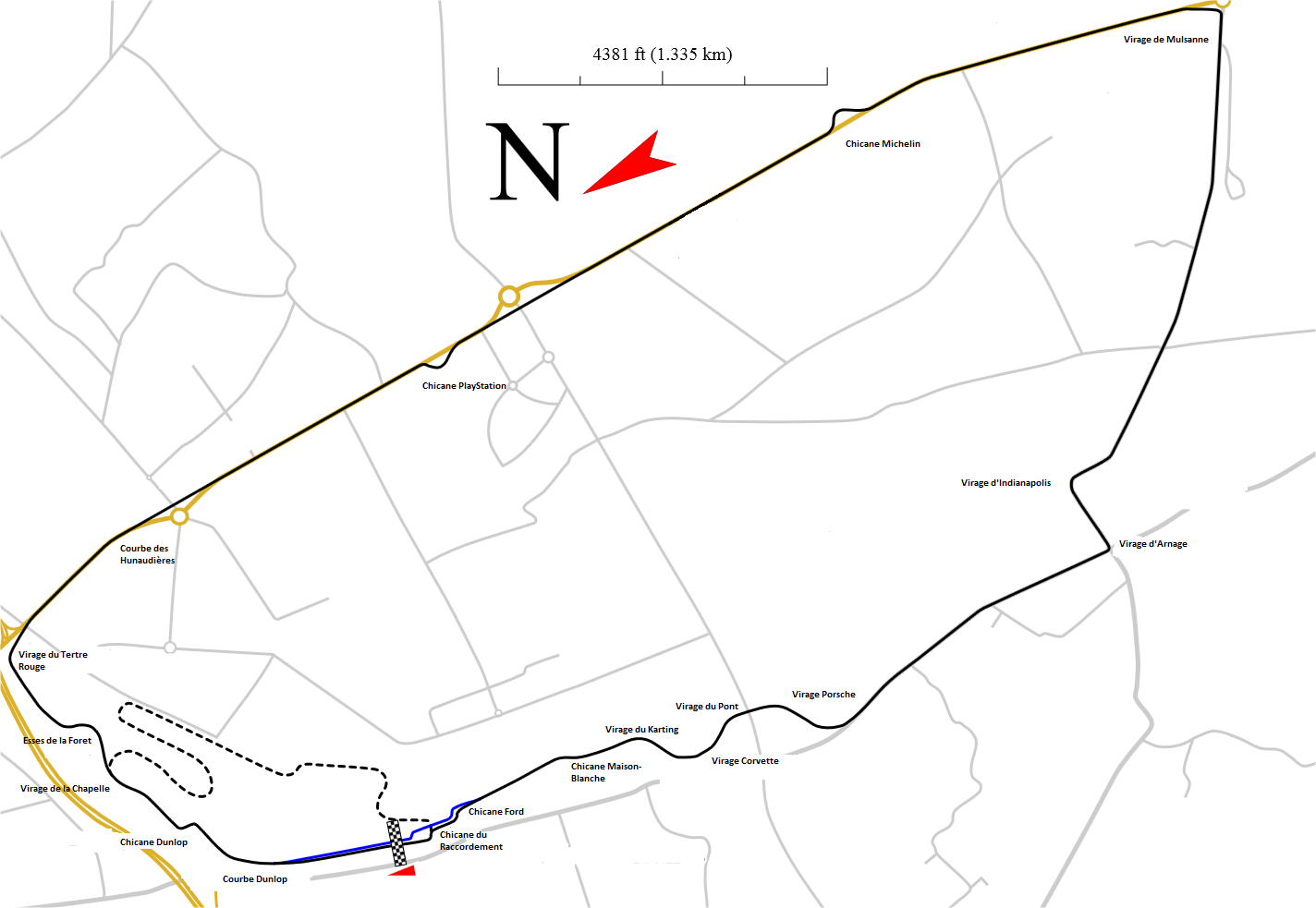 Plan du Circuit automobile des 24 Heures du Mans